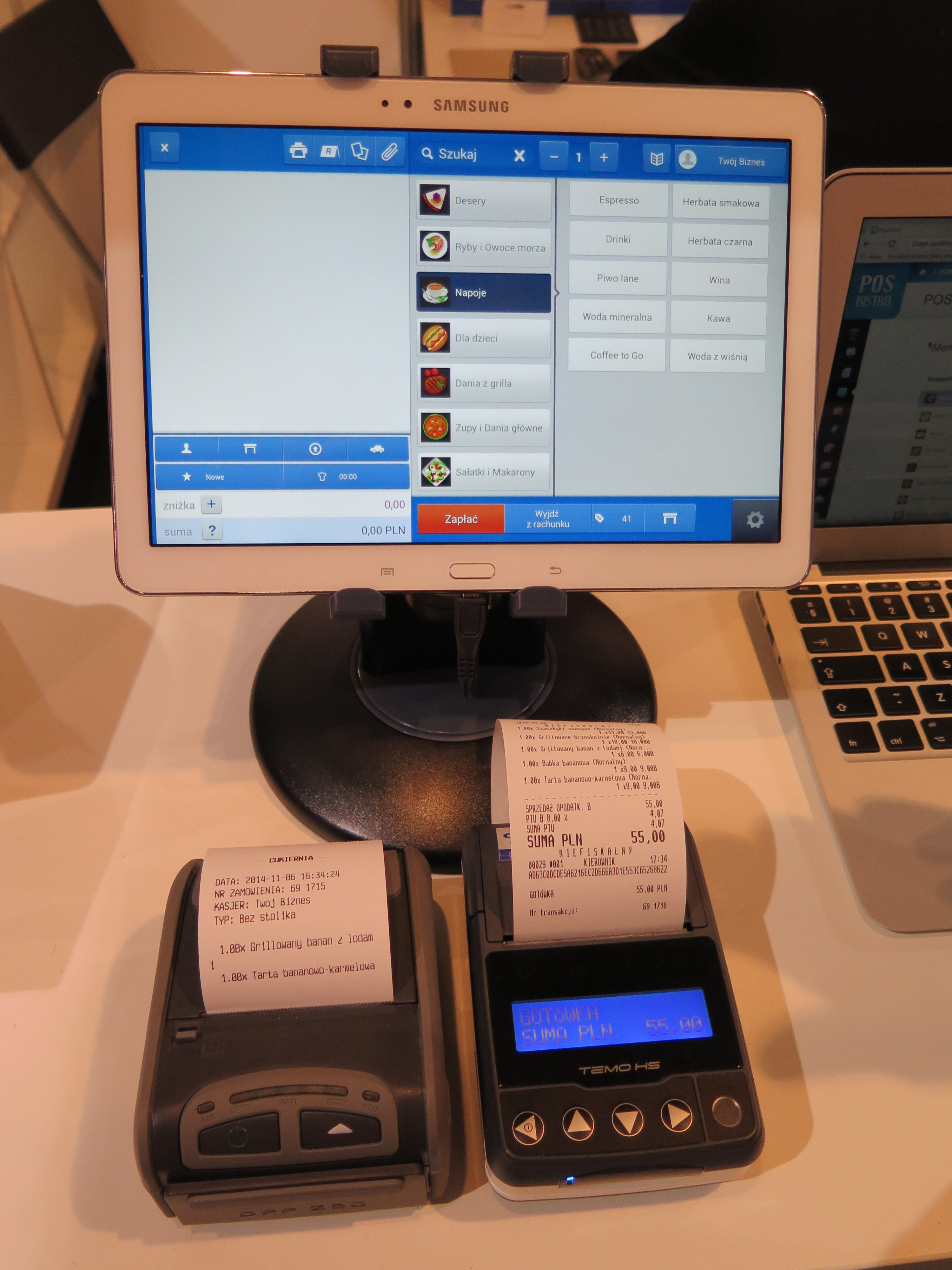 Systemy POS podczas HORECA 2014 w Krakowie